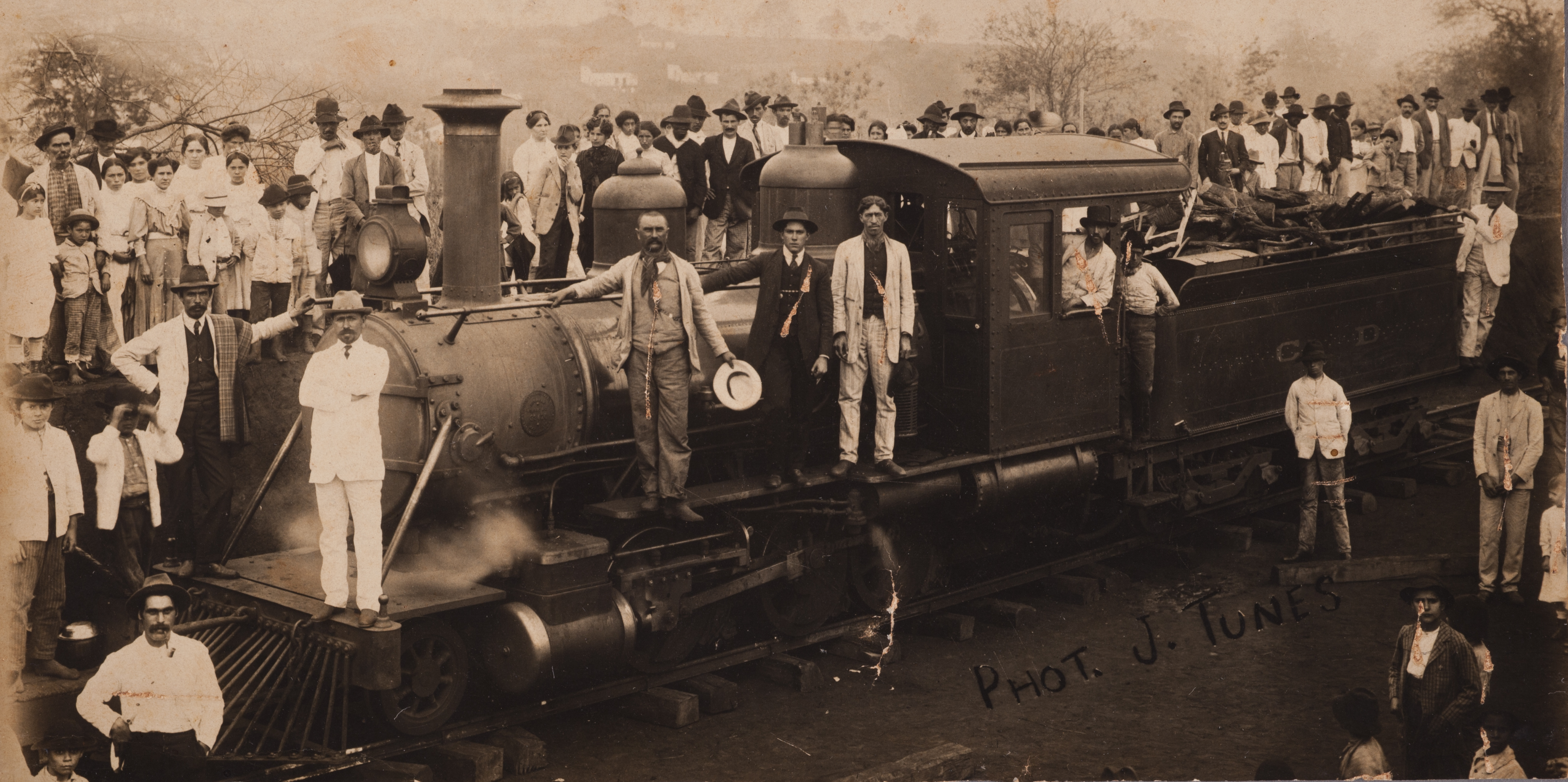 Obra que integra o acervo do Museu Paulista da USP. Coleção João Baptista de Campos Aguirra.